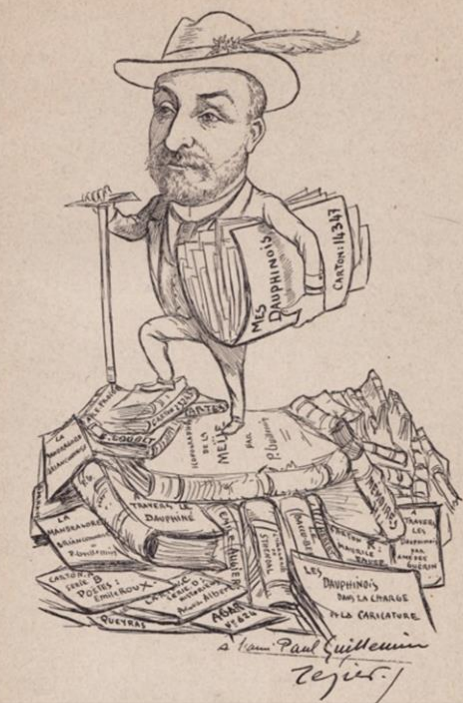 Caricature de Paul Guillemin, par Eugène Tézier, publiée en 1904